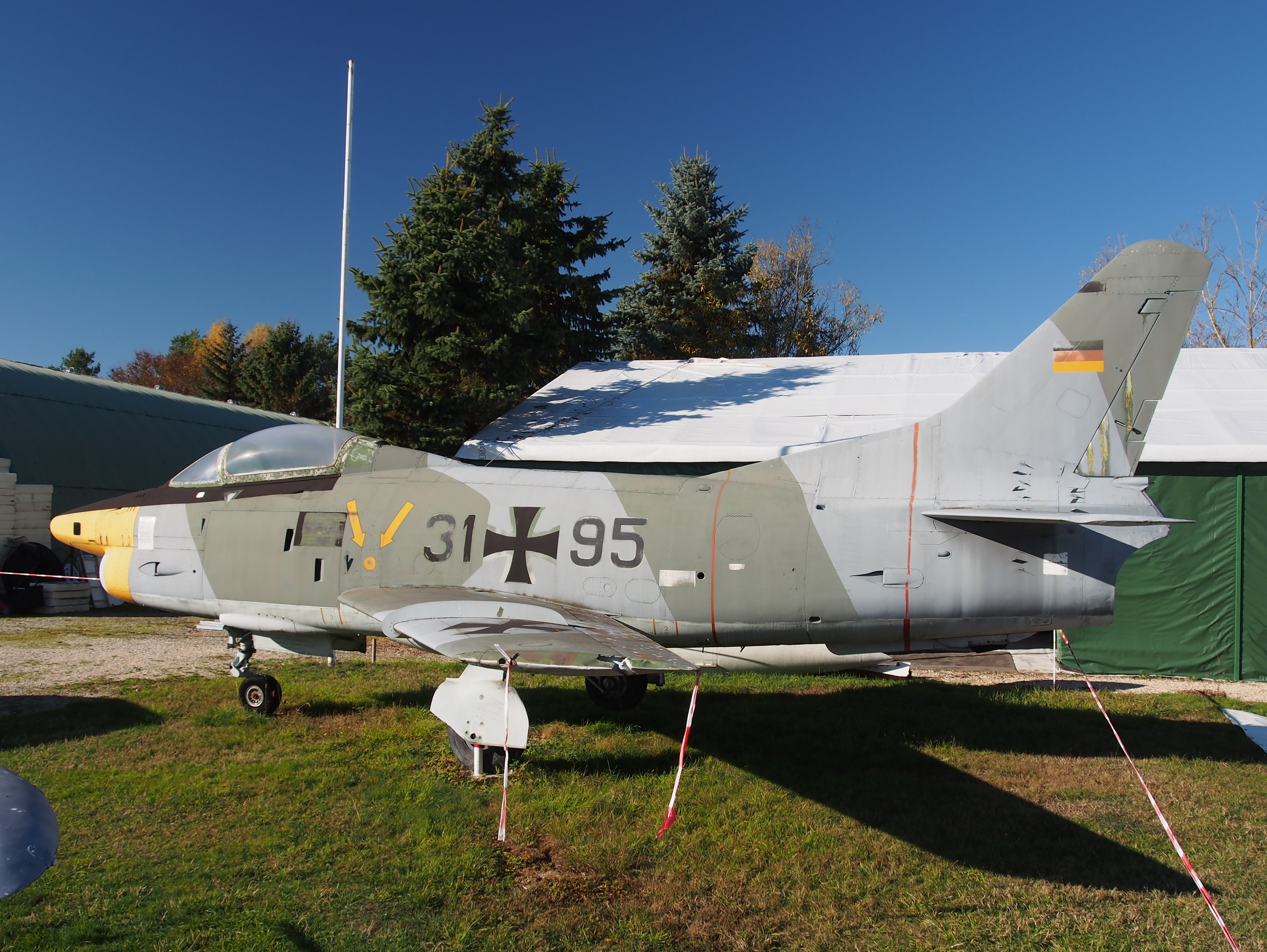 Photographed at the Luftfahrtmuseum Villingen-Schwenningen.